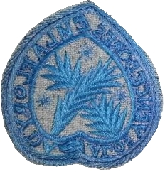 Escudo otorgado a los vencedores de la Batalla de La Florida. Réplica producida por Regmientos de America